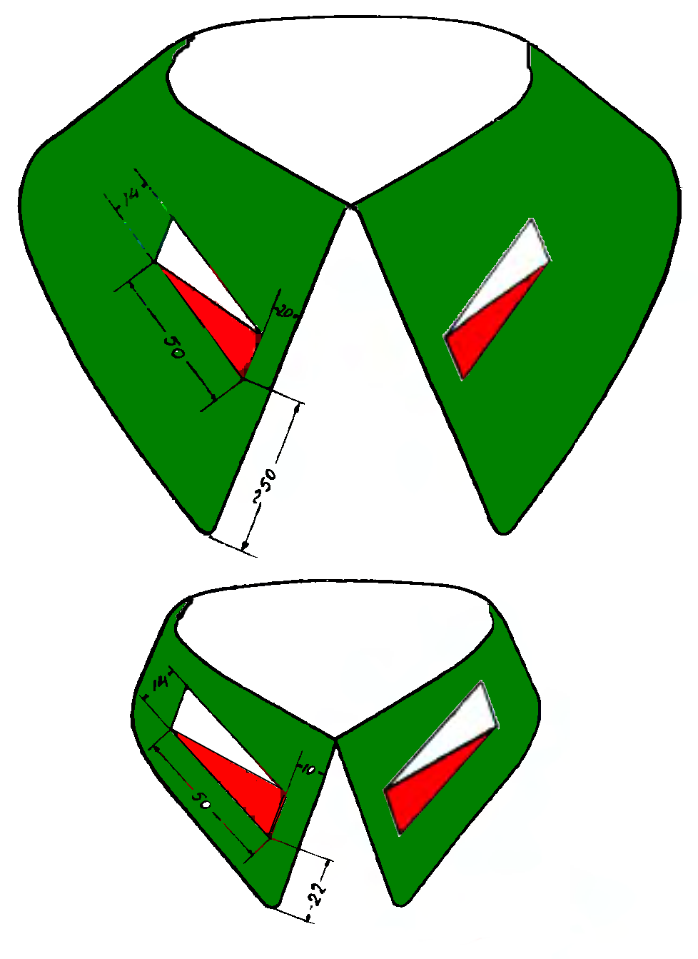 Proporczyki na mundur w Obronie Narodowej